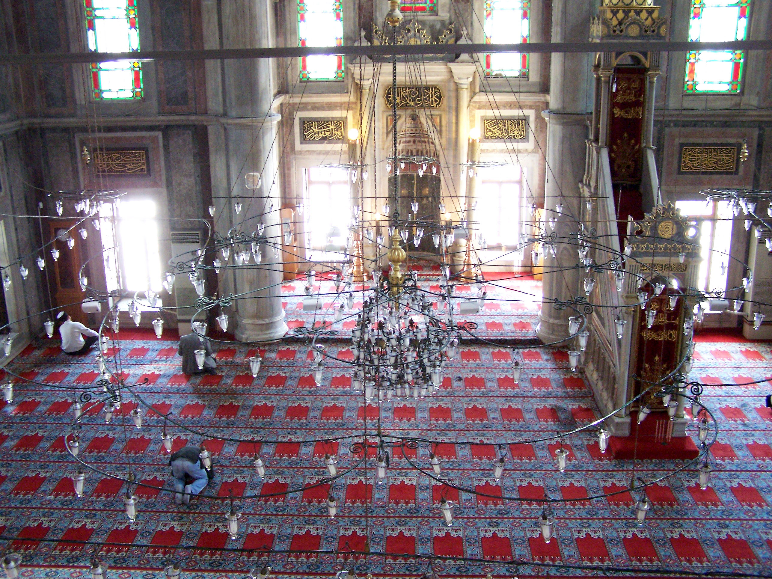 Interior of Laleli Camii in Laleli.